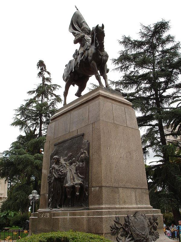 Equestrian Monument to Manuel Belgrano (1926), by sculptor Víctor Garino, in San Salvador de Jujuy, Argentina.